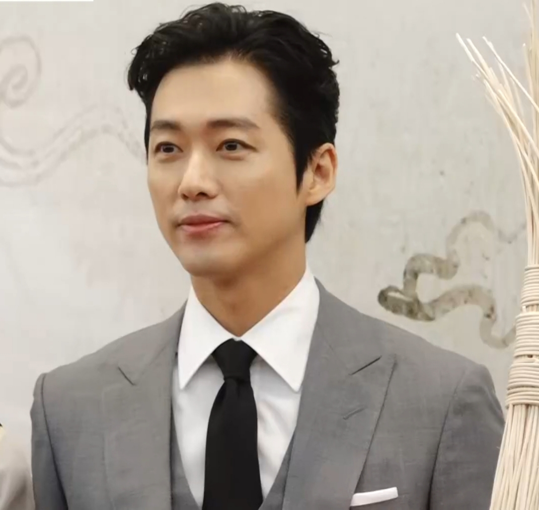 2019년 1월 한우홍보대사 행사에 참석한 남궁민